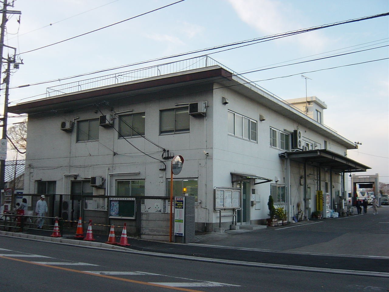 西武バス練馬営業所(南田中車庫)の建物の全景。